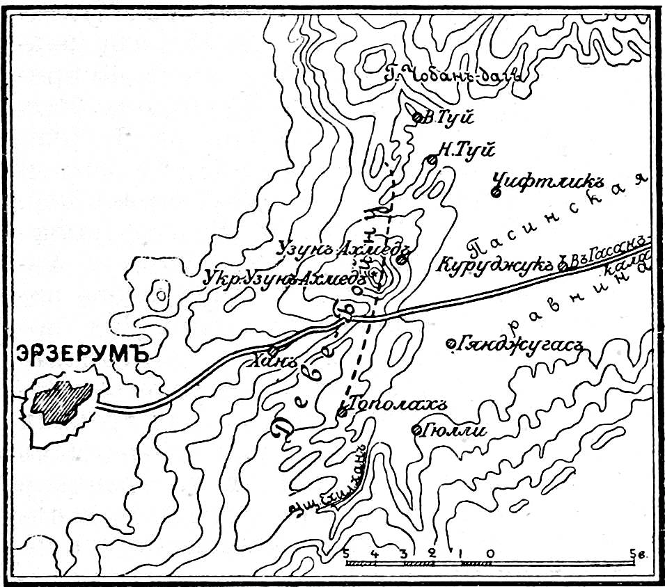 Театр военных действий в Сражении при Деве-бойну. Это изображение было использовано для иллюстрирования статьи «Деве-Бойну» опубликованной в девятом томе «Военной энциклопедии», который был издан книгоиздательским товариществом И. Д. Сытина в 1912 году в столице Российской империи городе Санкт-Петербурге.